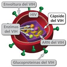 El virus se puede transmitir mediante el contacto con la sangre, el semen o los fluidos vaginales infectados. Al cabo de pocas semanas de la infección con el VIH, pueden aparecer síntomas como fiebre, dolor de garganta y fatiga. Luego, la enfermedad suele ser asintomática hasta que se convierte en SIDA. Los síntomas incluyen pérdida de peso, fiebre o sudores nocturnos, infecciones recurrentes y fatiga. No existe una cura para el SIDA, pero la observancia estricta de la terapia antirretroviral puede disminuir significativamente el progreso de la enfermedad y evitar infecciones y complicaciones secundarias.